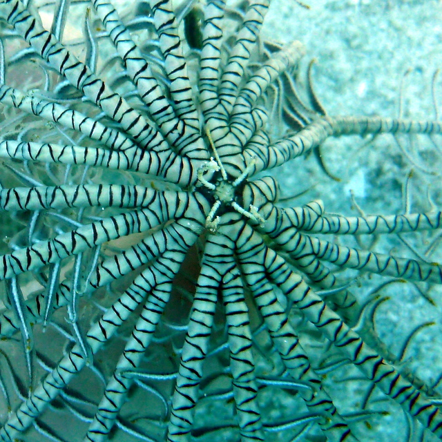 Comanthus suavia, reverso mostrando los cirri